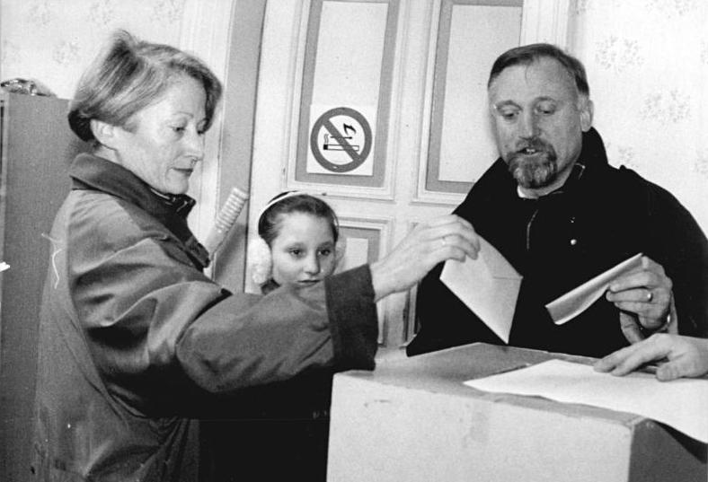 Stendal, Bundestagswahl, Gerd Giese ADN-ZB Gahlbeck 2.12.90 cmv Stendal: Wahlen. Der Ministerpräsident des Landes Sachsen-Anhalt, Dr. Gerd Giese, wählte gemeinsam mit seiner Ehefrau Christel in seinem Heimatort Stendal im Wahllokal Altes Dorf 22.